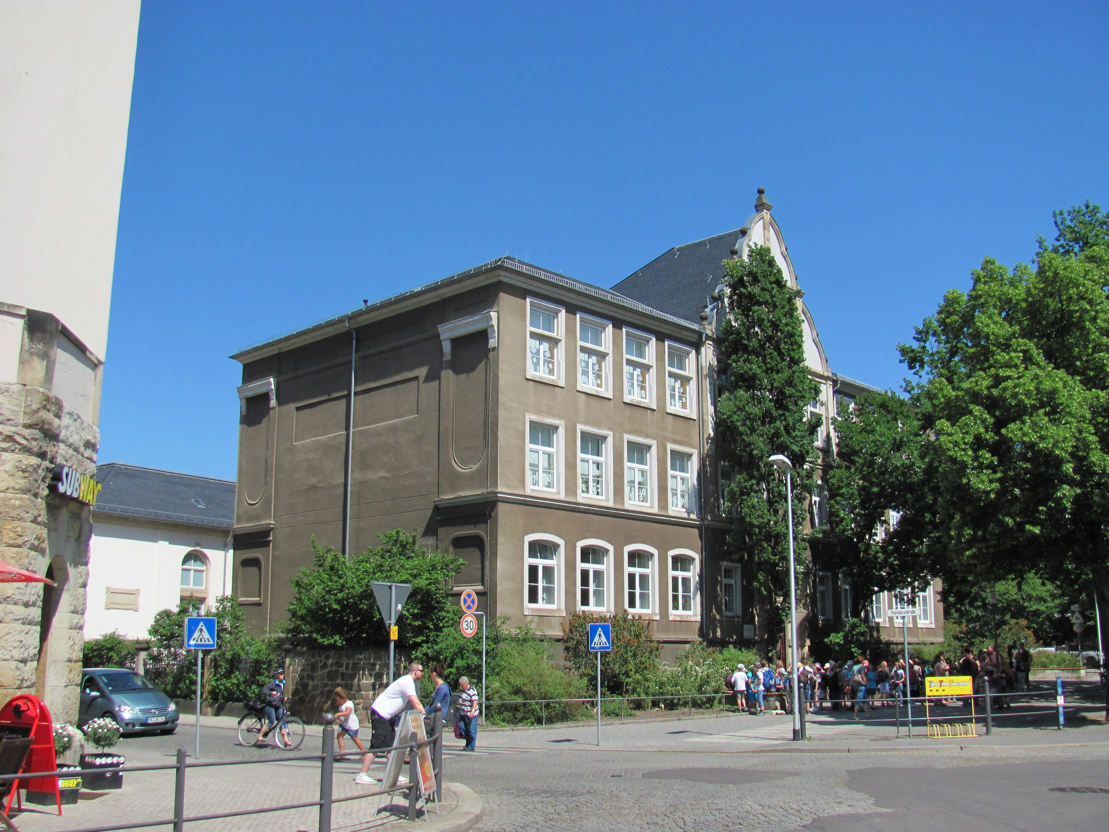 Radebeul Schillerschule